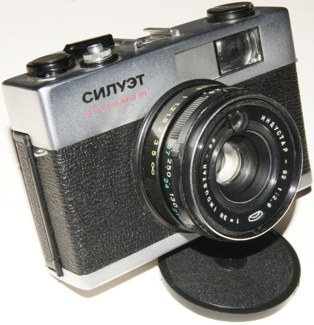 советский шкальный фотоаппарат «Силуэт-автомат»